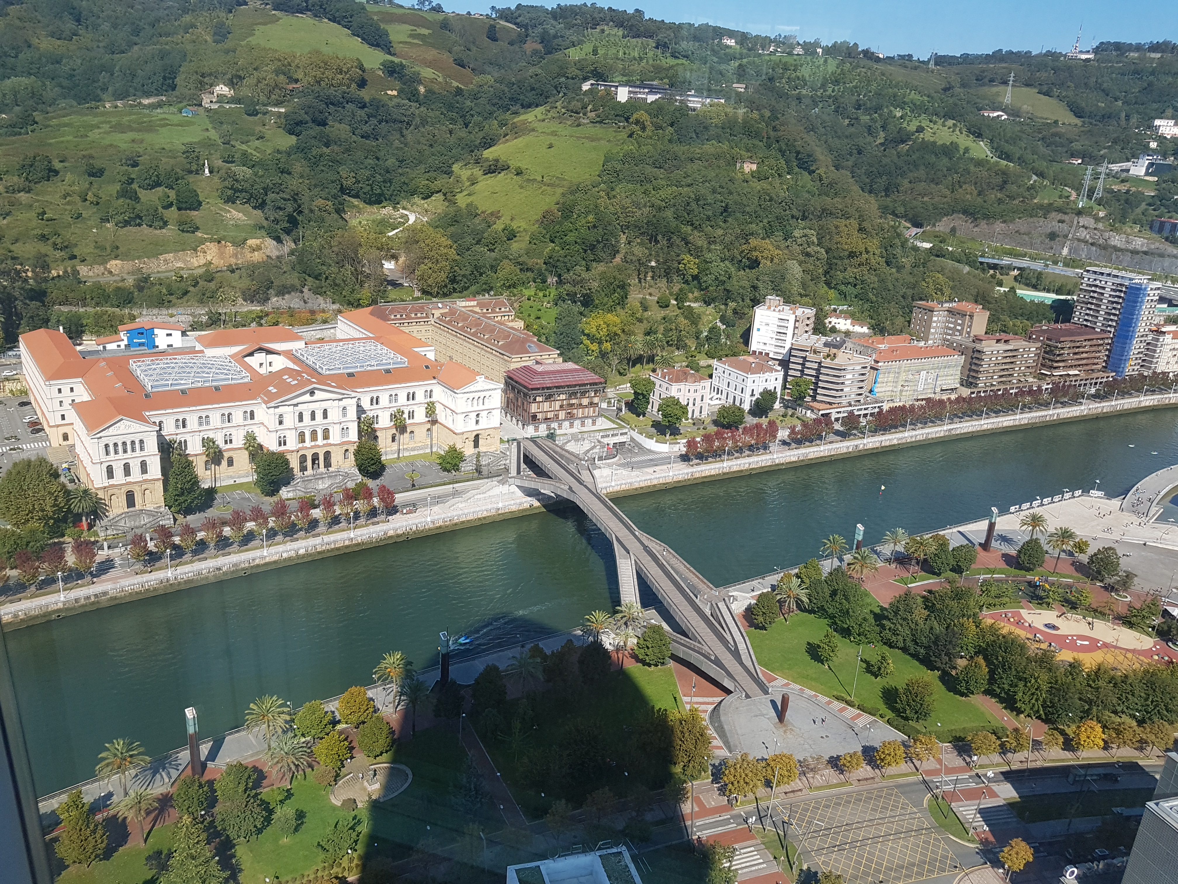 Abandoibarra.